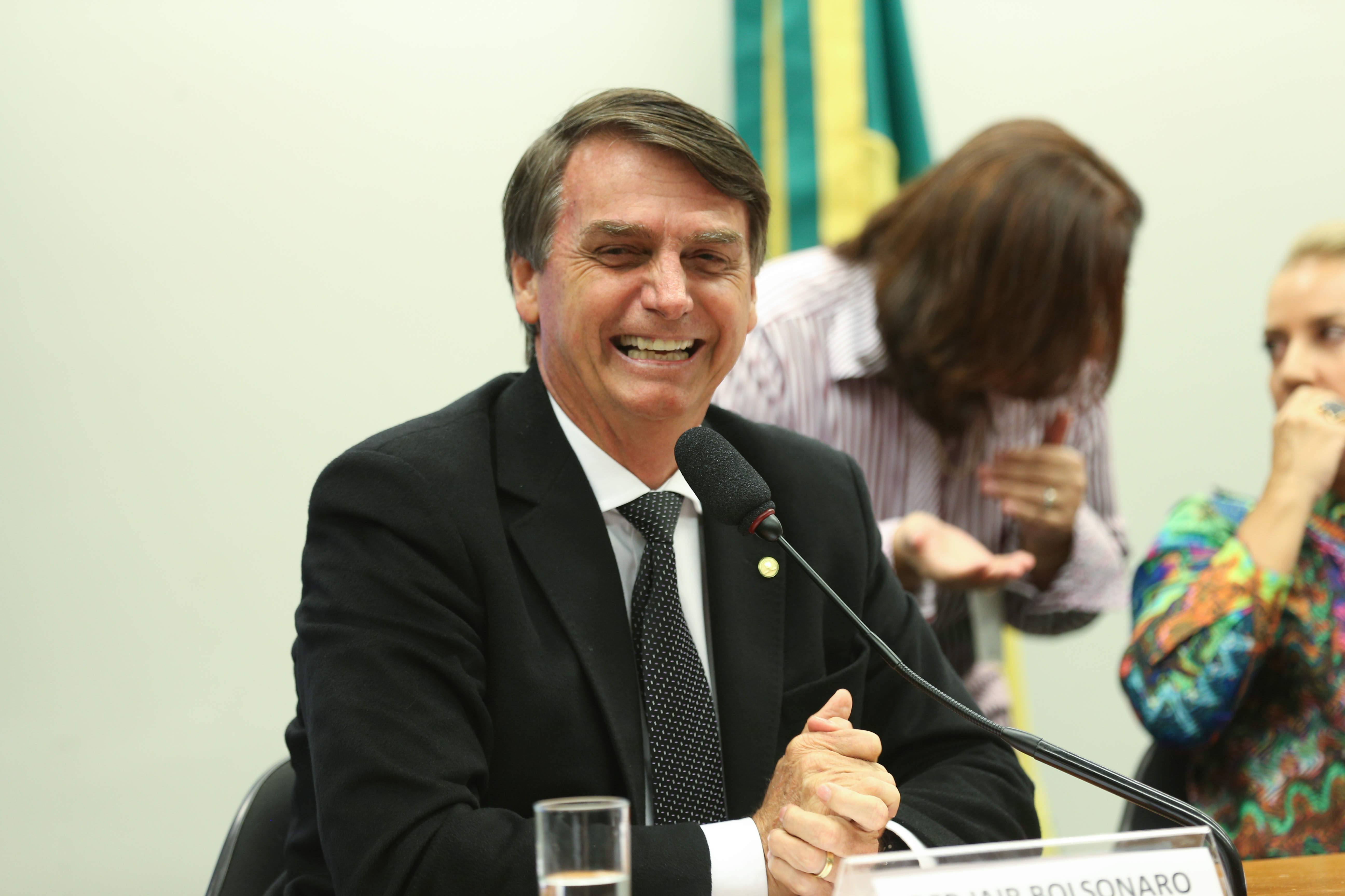 Brasília - Conselho de Ética rejeita processo contra o deputado Jair Bolsonaro, por elogiar Brilhante Ustra (Fabio Rodrigues Pozzebom/Agência Brasil)